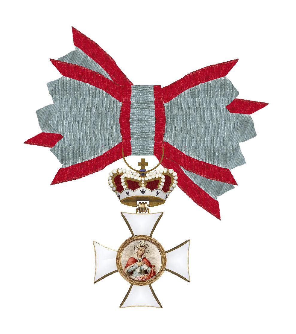 Sankt Elisabethorden